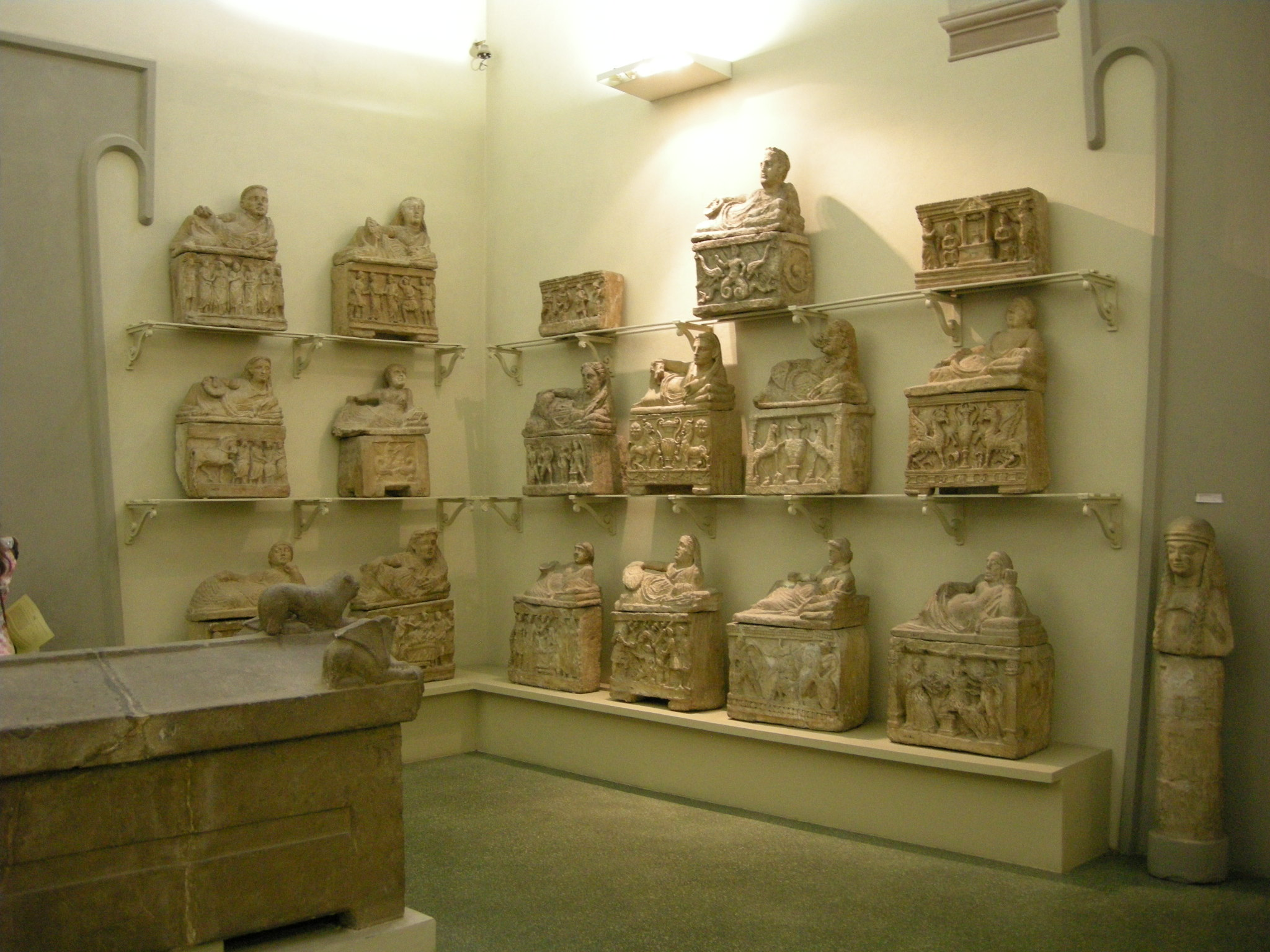 Sala delle urnette etrusche